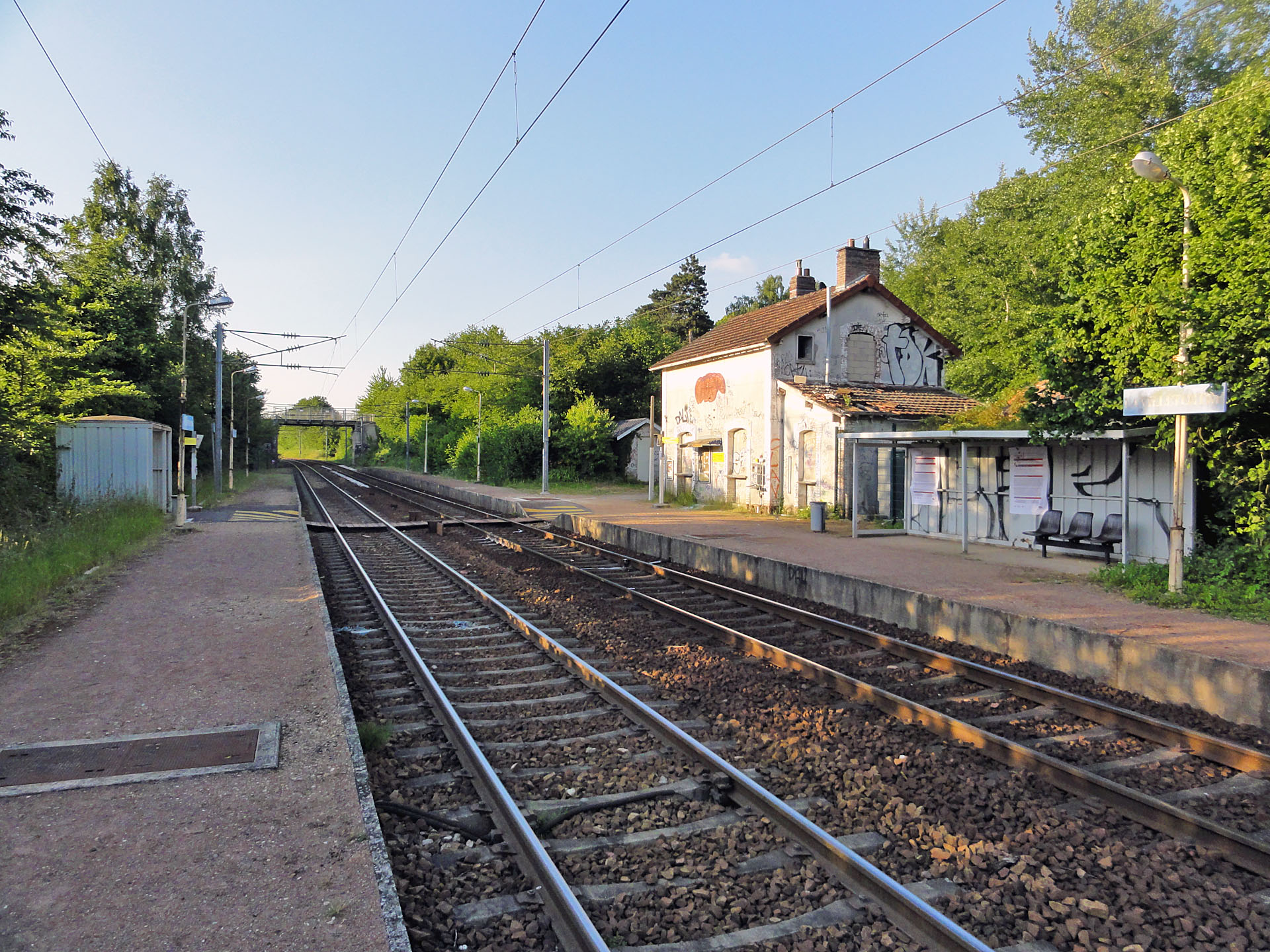 La gare de Lavilletertre, Oise, France.